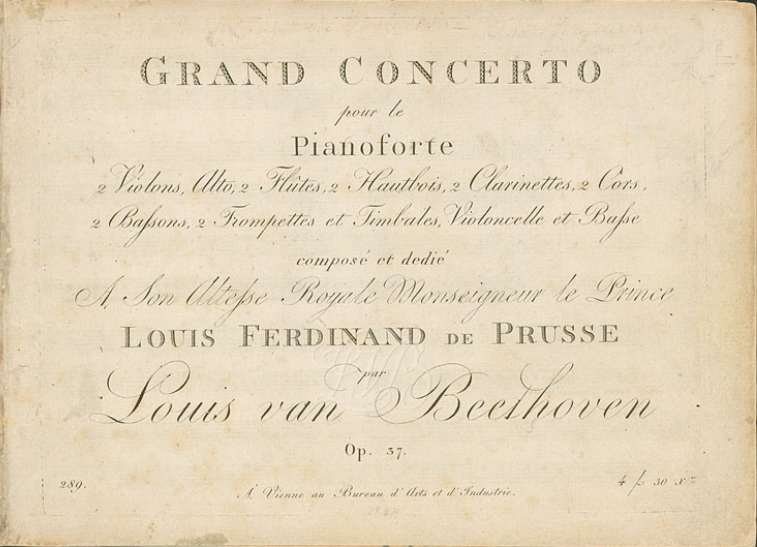 Page de garde de la première édition du Concerto pour piano n° 3 en do mineur Op. 37 de Ludwig van Beethoven (1804) Edition Viennoise du Bureau des Arts et d'Industrie